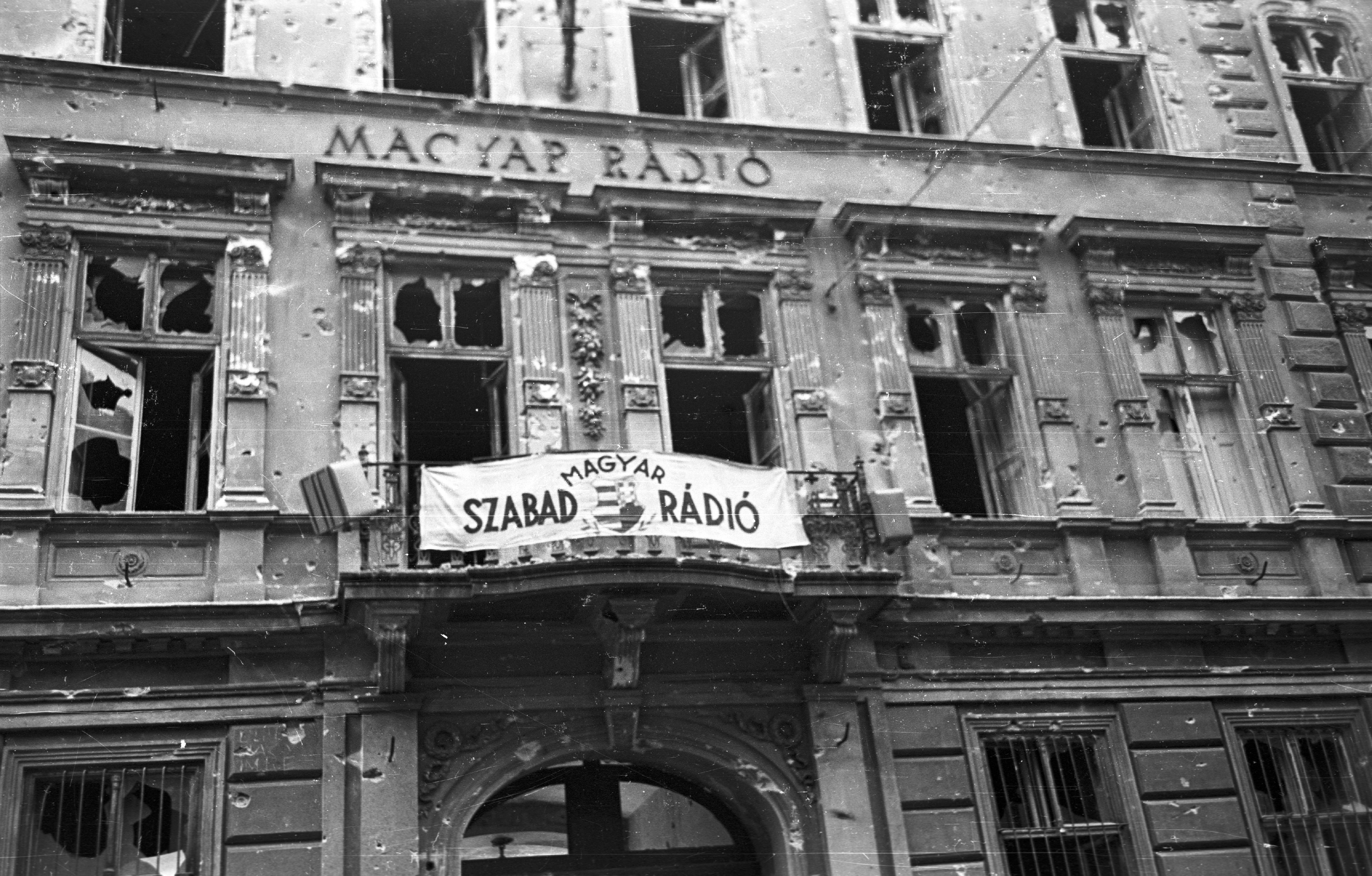 Bródy Sándor utca 5-7., Magyar Rádió.